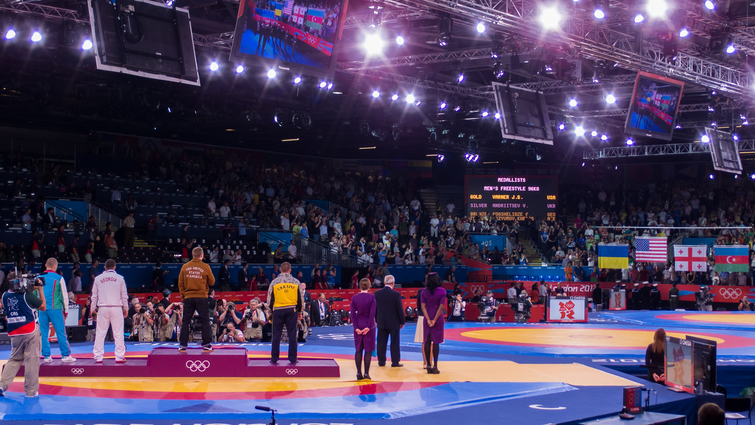 USA v Ukraine